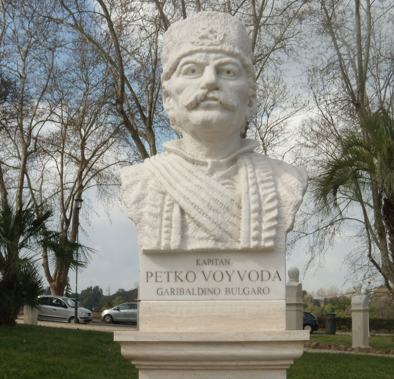 Busto restaurato del capitano Petko Vojvoda (1844-1900), rivoluzionario bulgaro